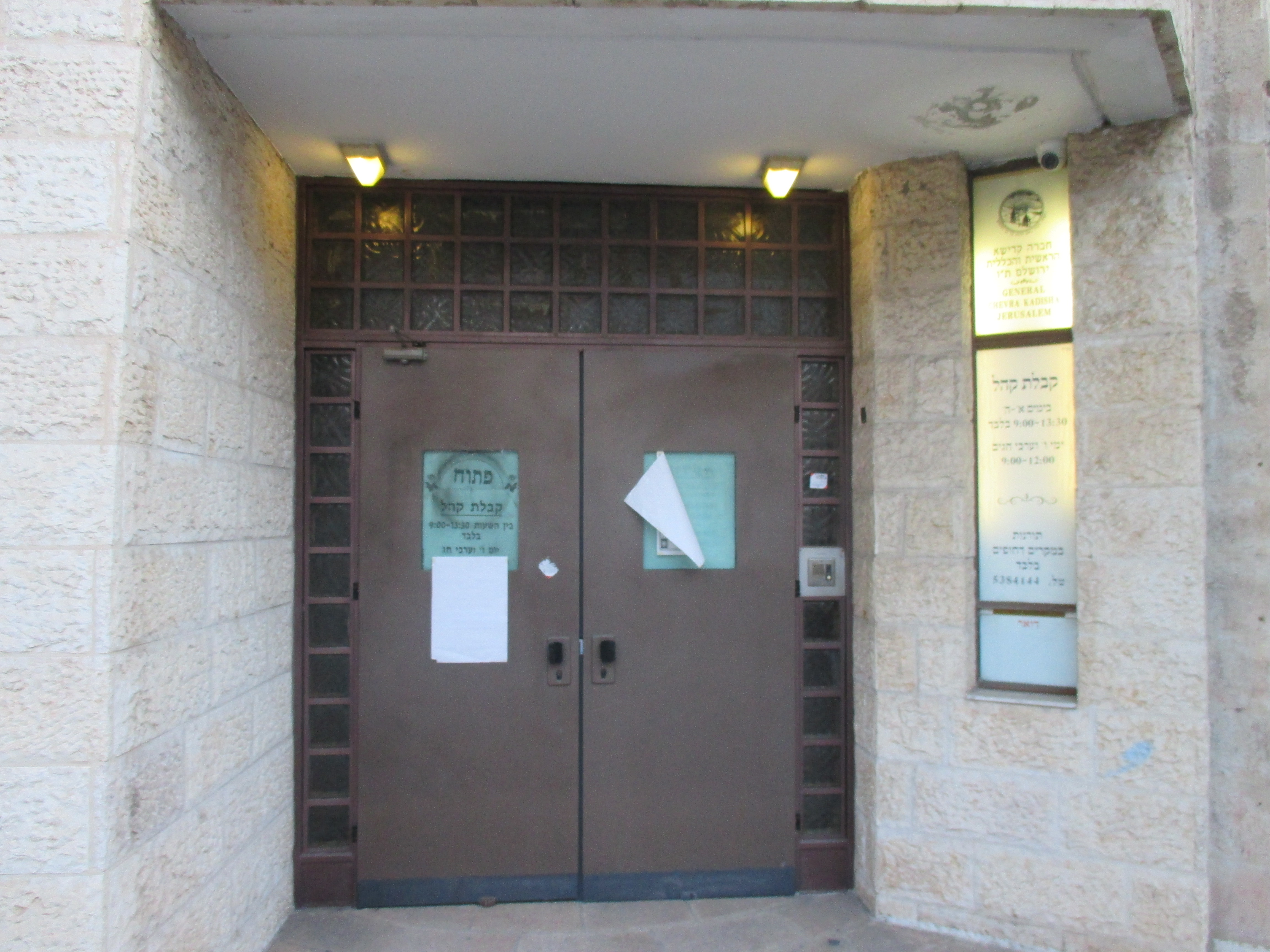 בניין החברא קדישא בירושלים